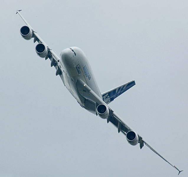 A380 flyby, ILA 2006 /A380 im schnellen Vorbeiflug auf der ILA 2006